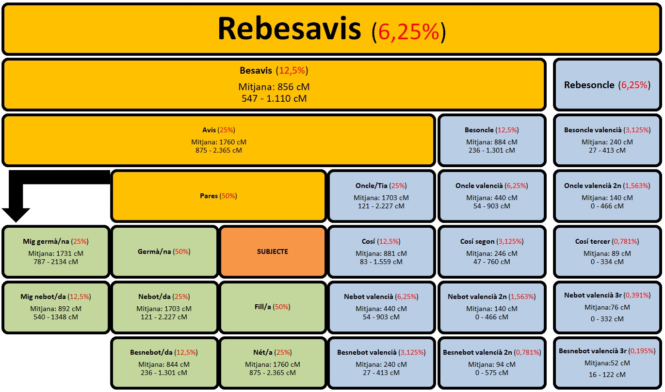 Adaptació al català del quadre de relacions familiars en el que s'indica el percentatge d'ADN compartit (en vermell) i els valors esperats en cM (mitjana i valors extrems).